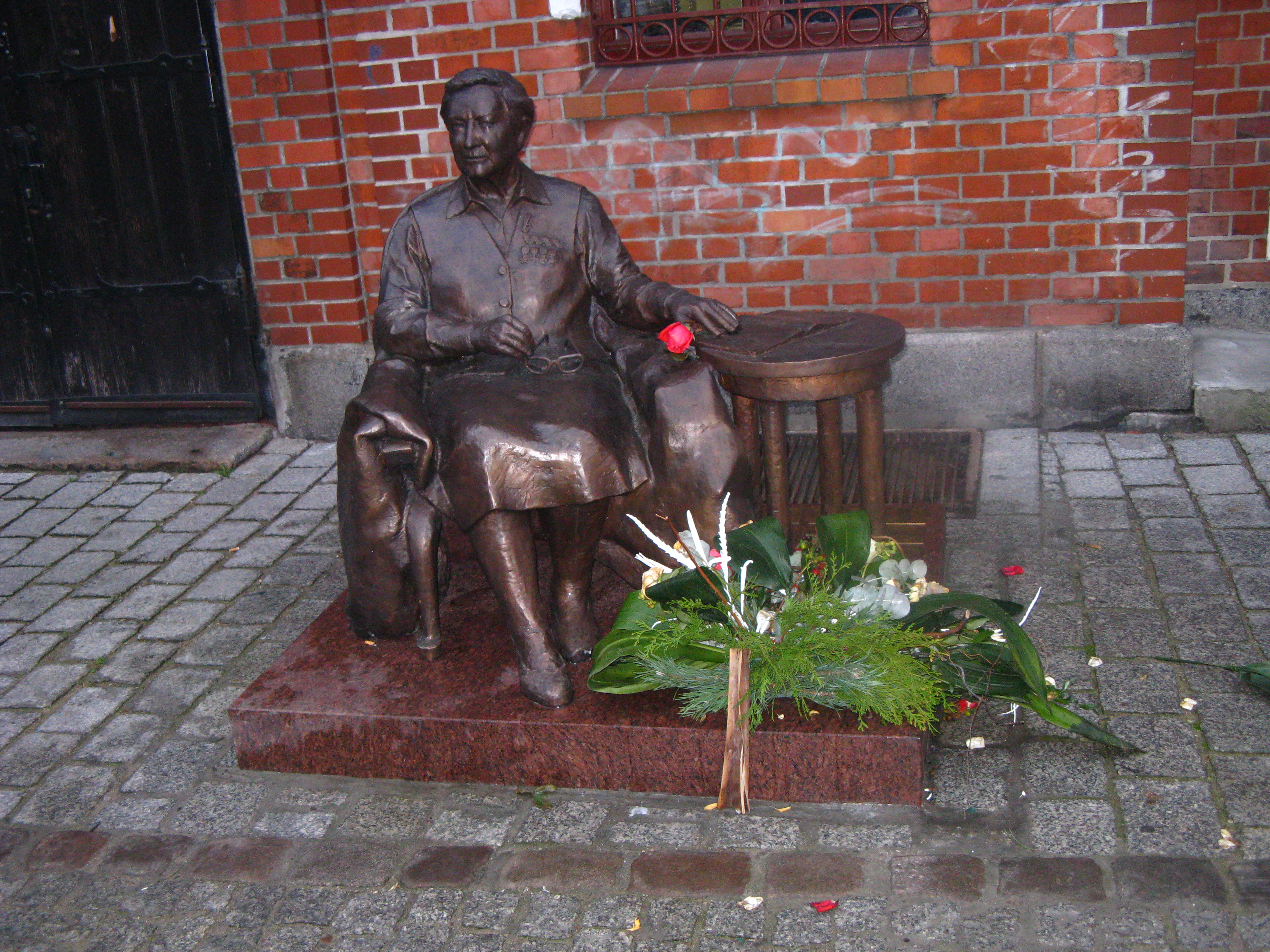 Pomnik Elżbiety Zawackiej w Toruniu, autorstwa Tadeusz Porębskiego, odsłonięty 23 września 2014